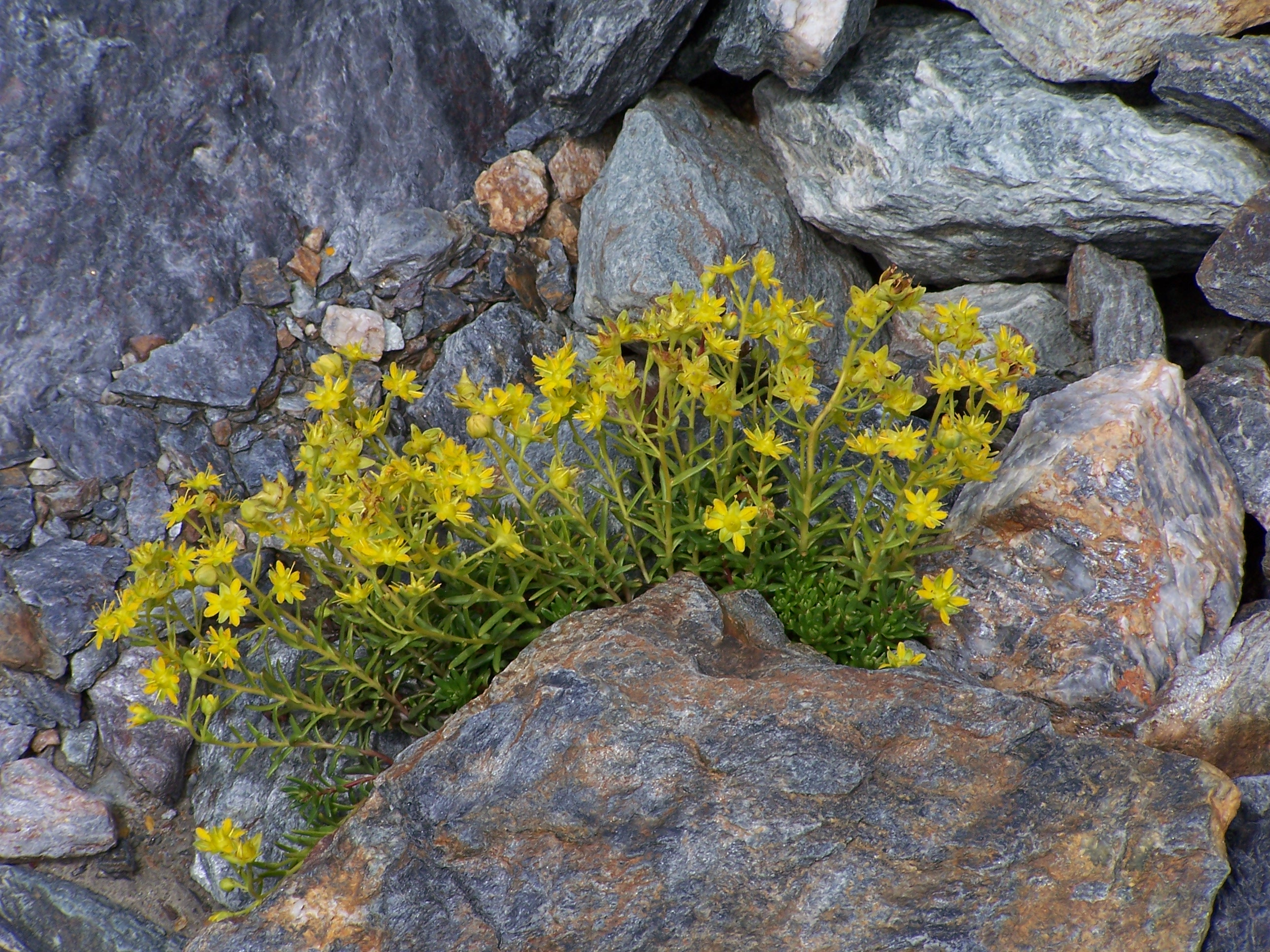 Fetthennen-Steinbrech (Saxifraga aizoides)